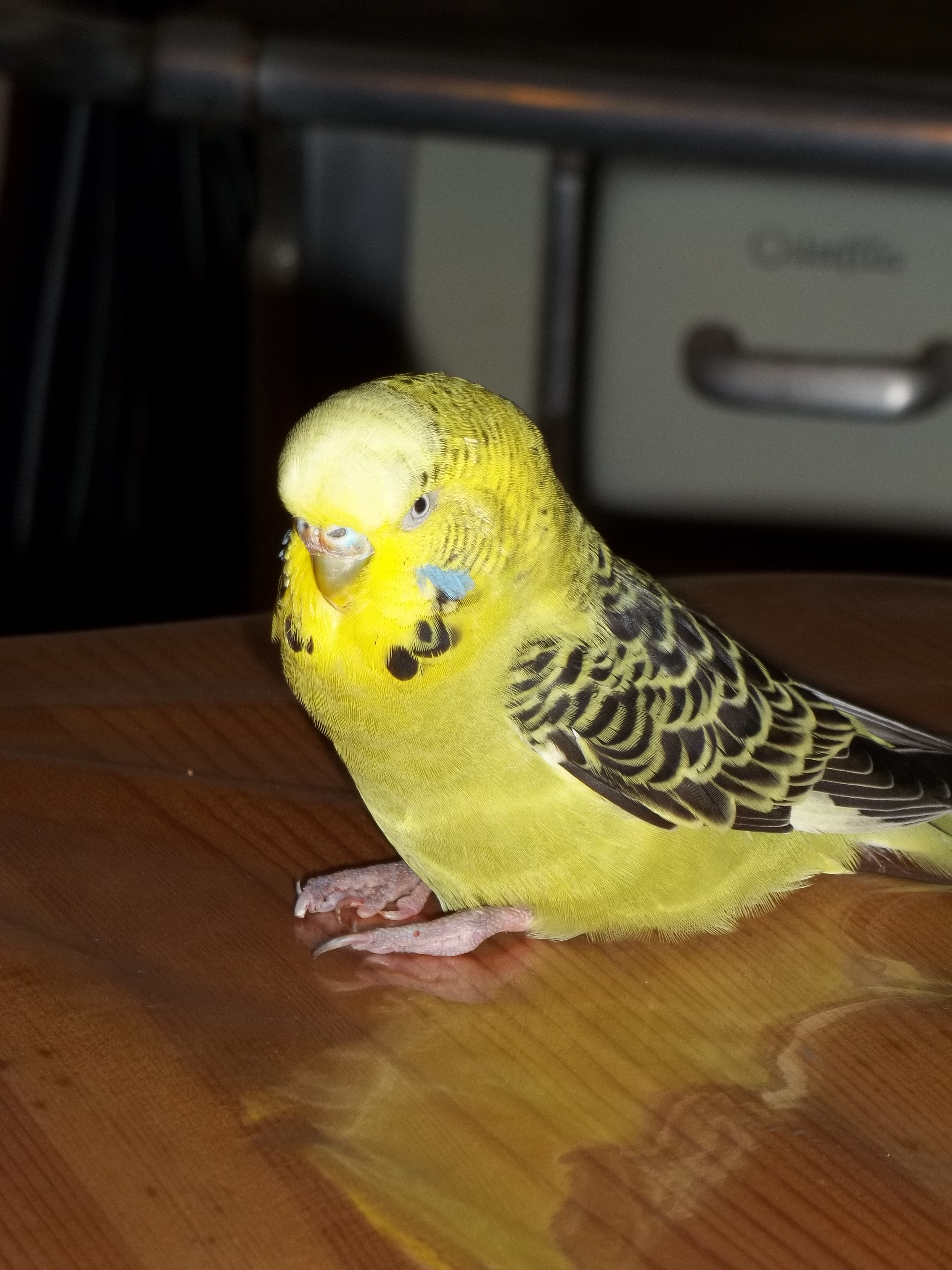 Ein graugrün-gelber etwa 4 Jahre alter weiblicher Wellensittich mit Vitamin-D-Mangel und daher bewegungslosen Füßen